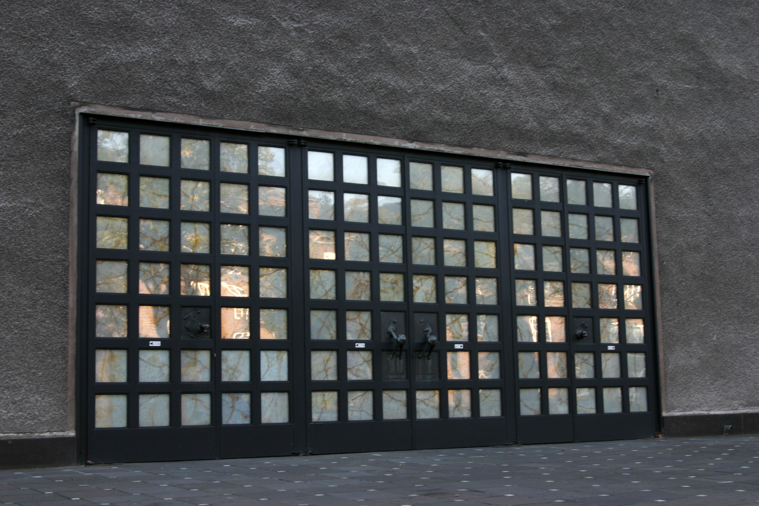 Pfarrkirche St. Bruno in Köln-Klettenberg, EingangThis is a photograph of an architectural monument.